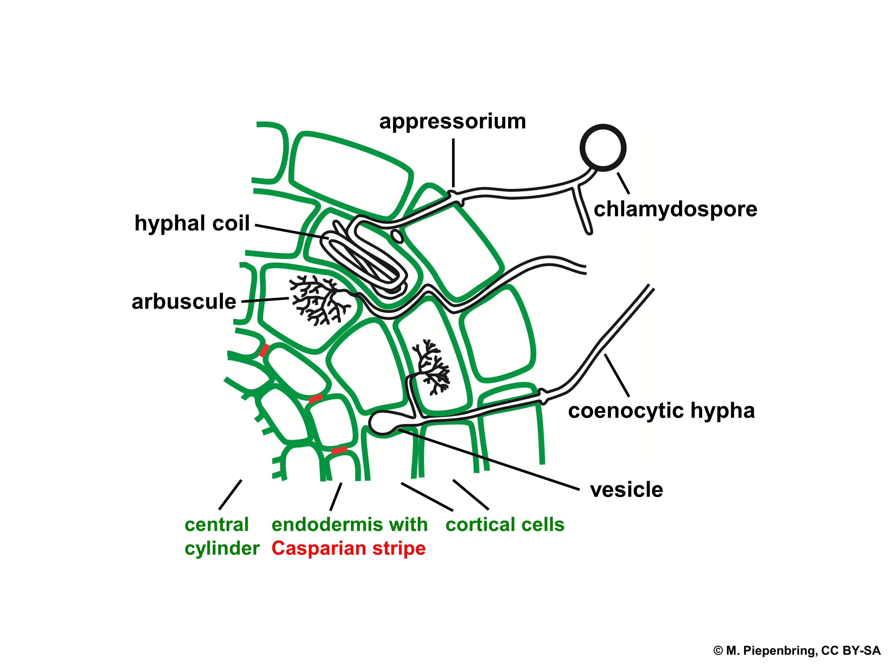 Biologische Schemata, gezeichnet und freigegeben von M. Piepenbring